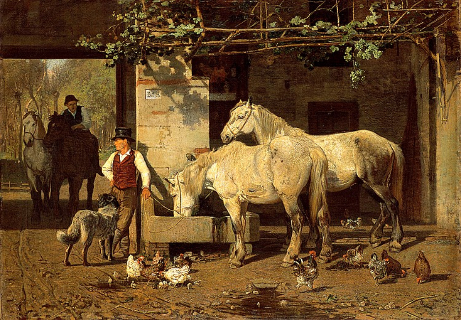 Animali condotti ad abbeverare